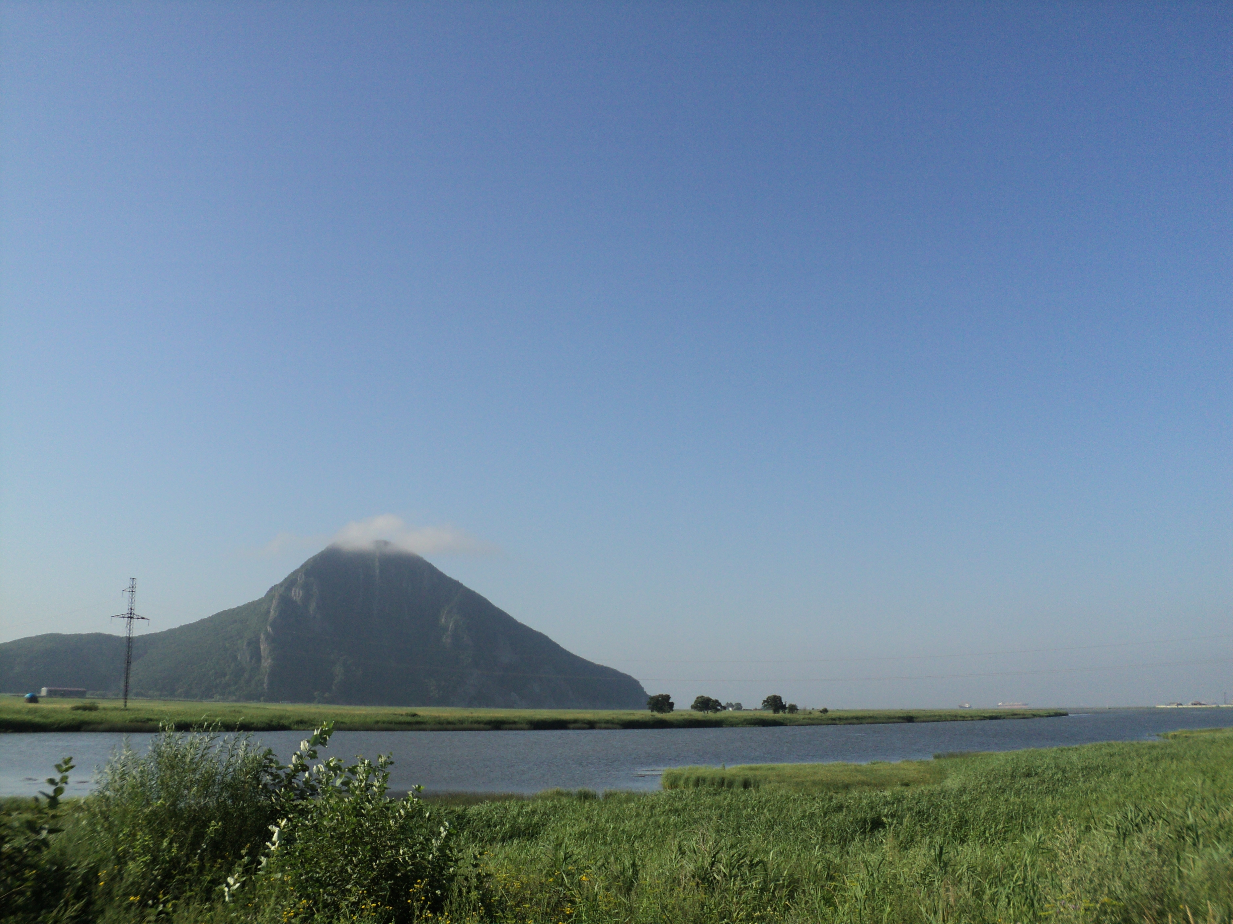 Гора Сестра у реки Сучан